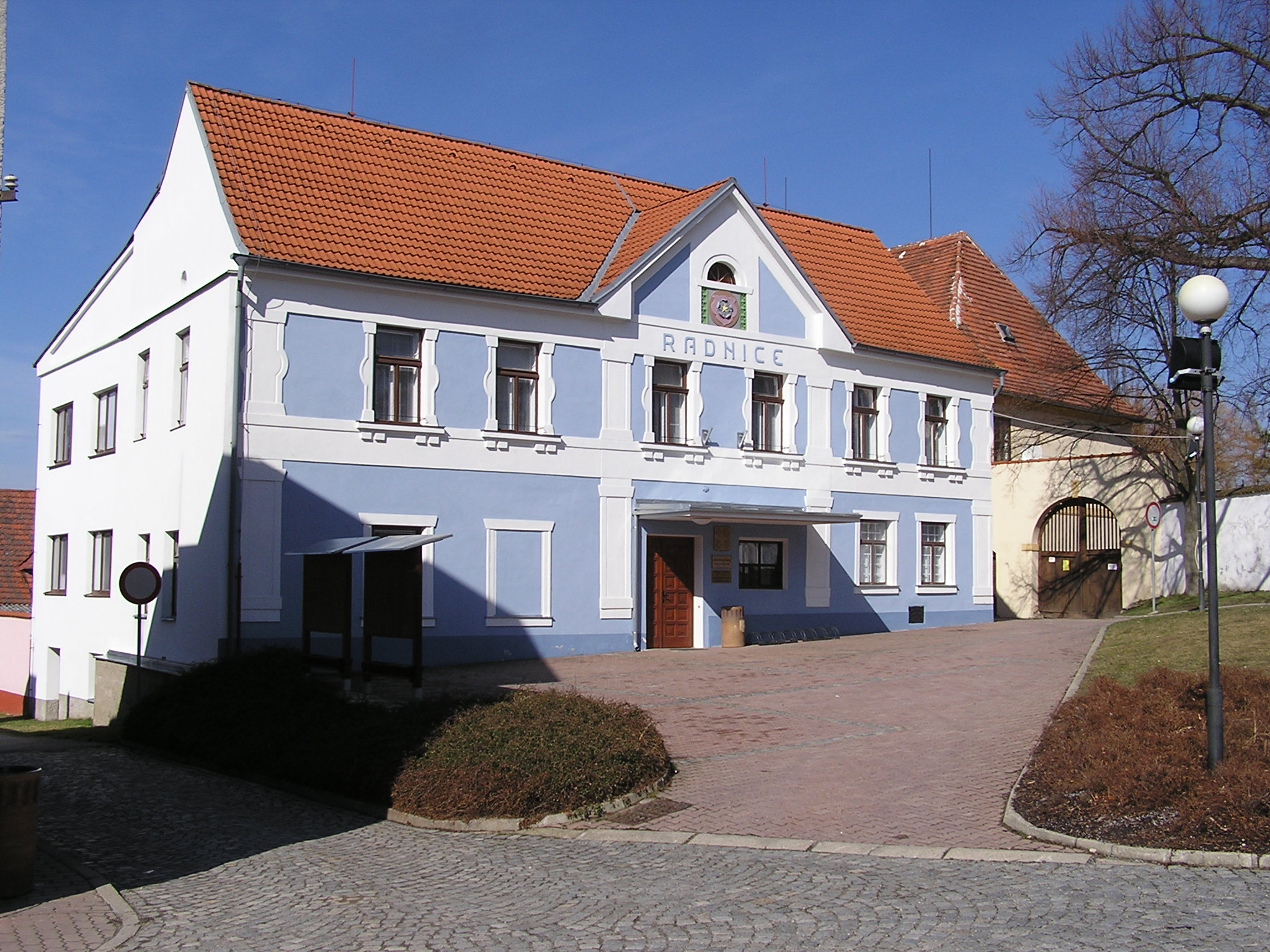 Radnice v Ledenicích (dříve pivovar)